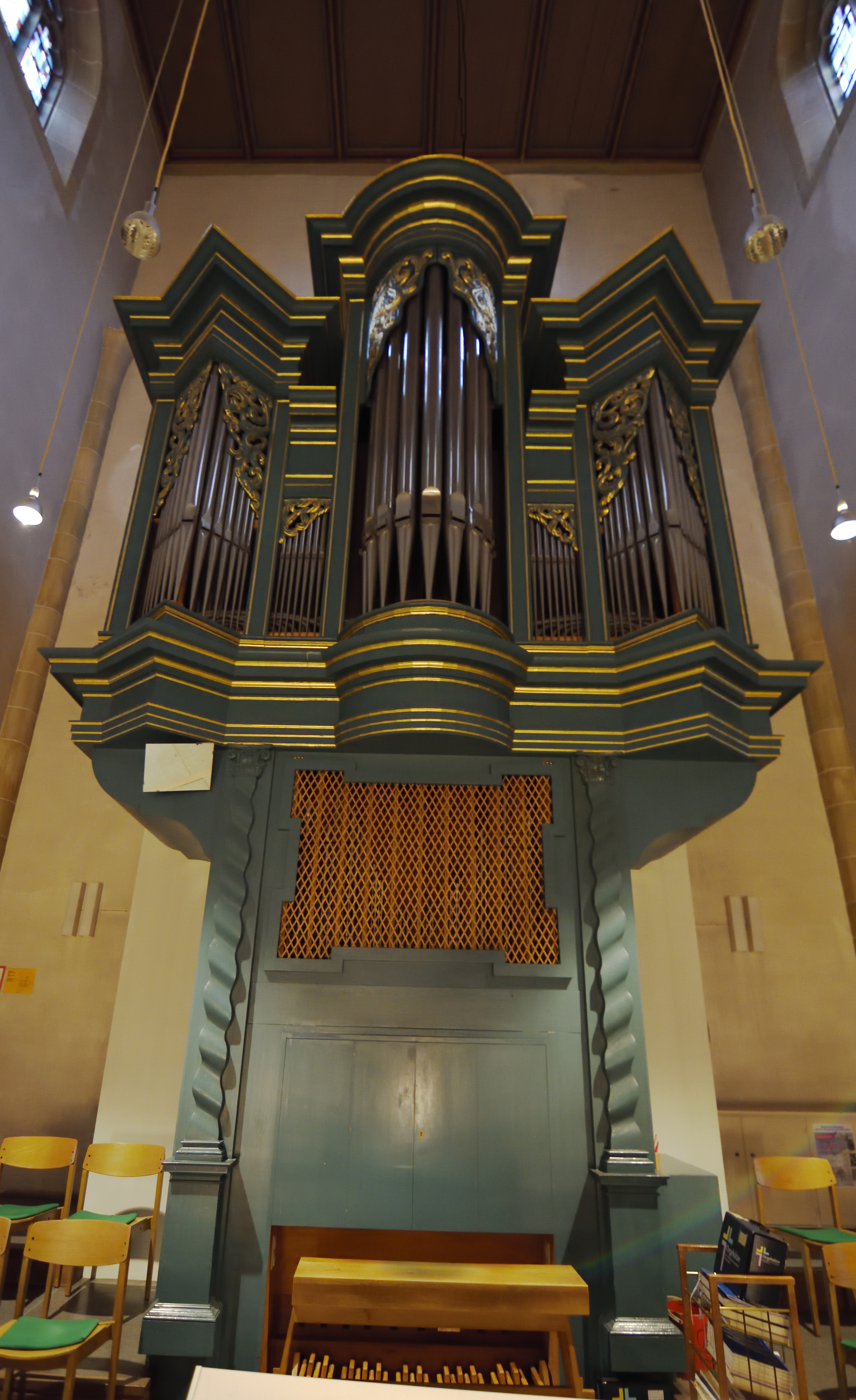 Stadtkirche Vaihingen an der Enz, Orgel